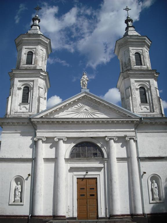 Kalvarijos Švč. Mergelės Marijos Vardo bažnyčia